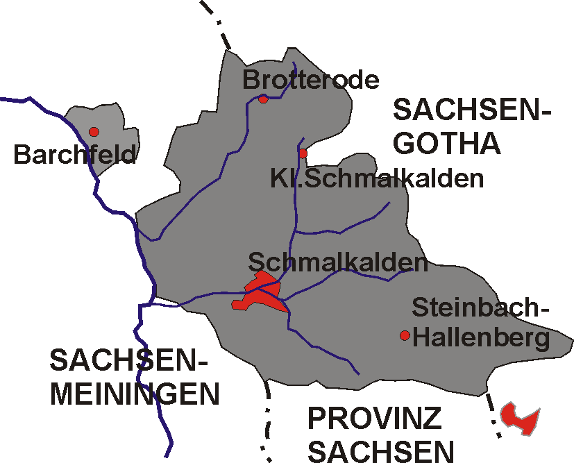 Karte Herrschaft Schmalkalden